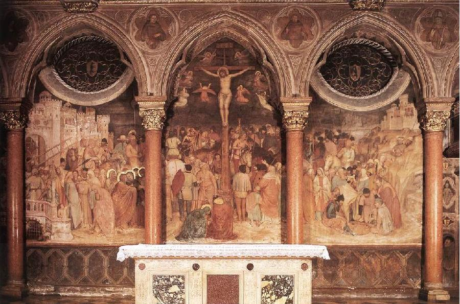 Fresco, 840 x 280 cm Basilica di SantAntonio, Padua